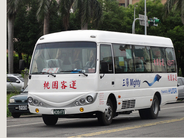 桃園客運2011 Hyundai Mighty 439-FT